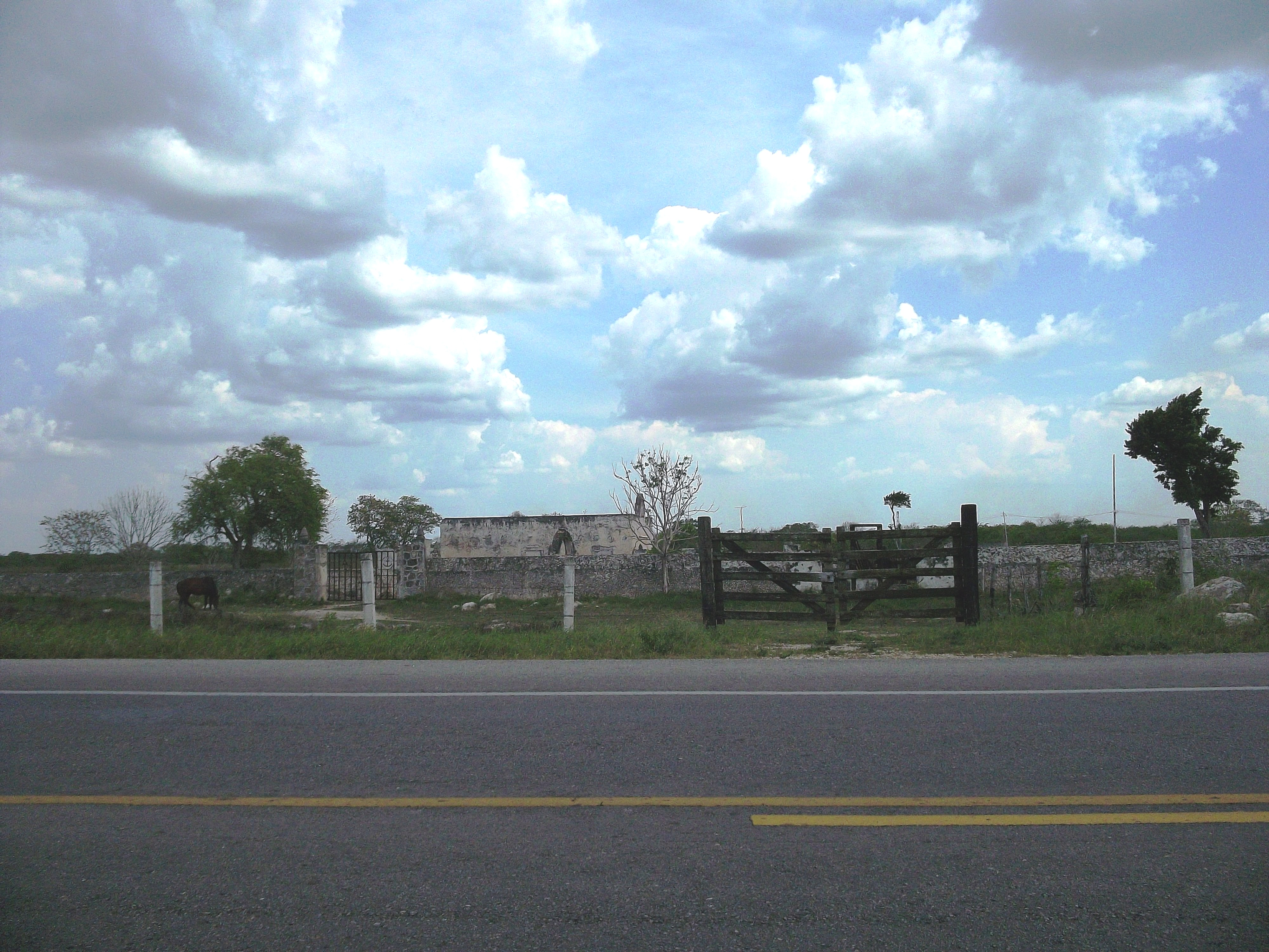 El Dorado (Temax), Yucatán.